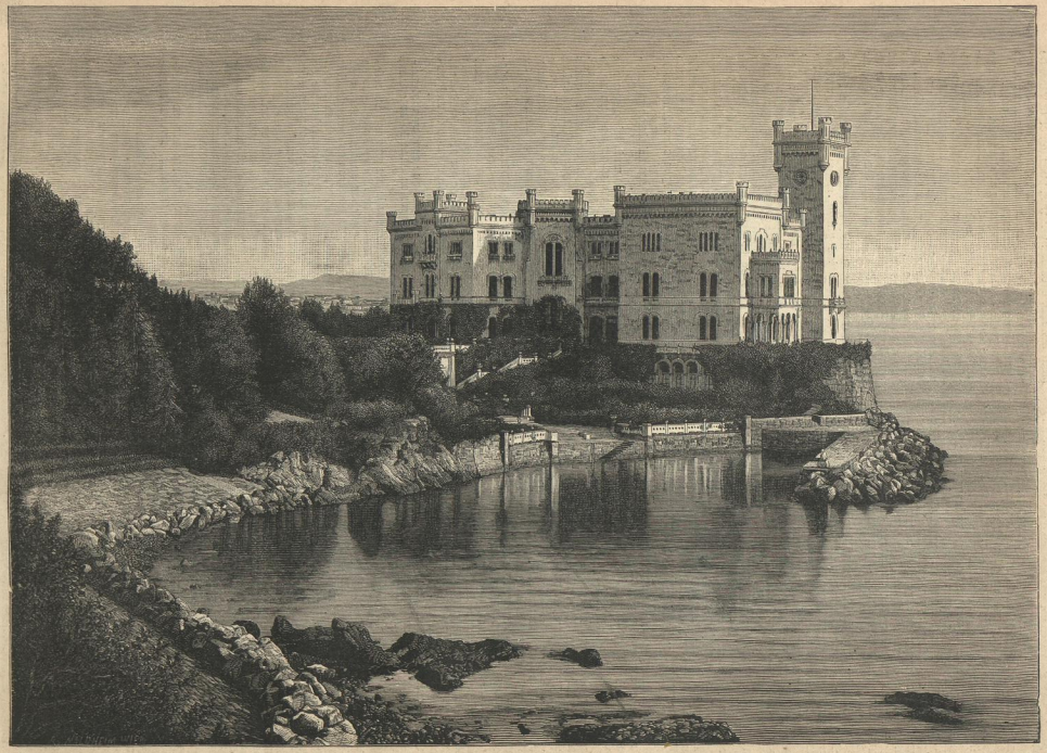 Castillo de Miramar, en la revista española La Hormiga de Oro.